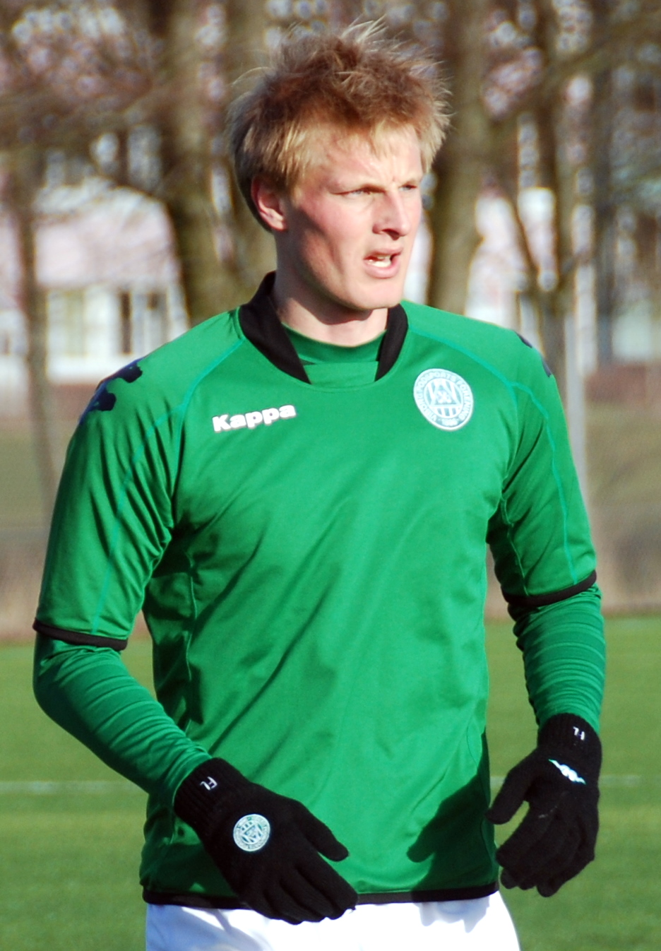 Fodboldspilleren Thomas Dalgaard fra Viborg FF. Her i en testkamp mod Blokhus FC på VFFs træningsanlæg på Kirkebækvej i Viborg.